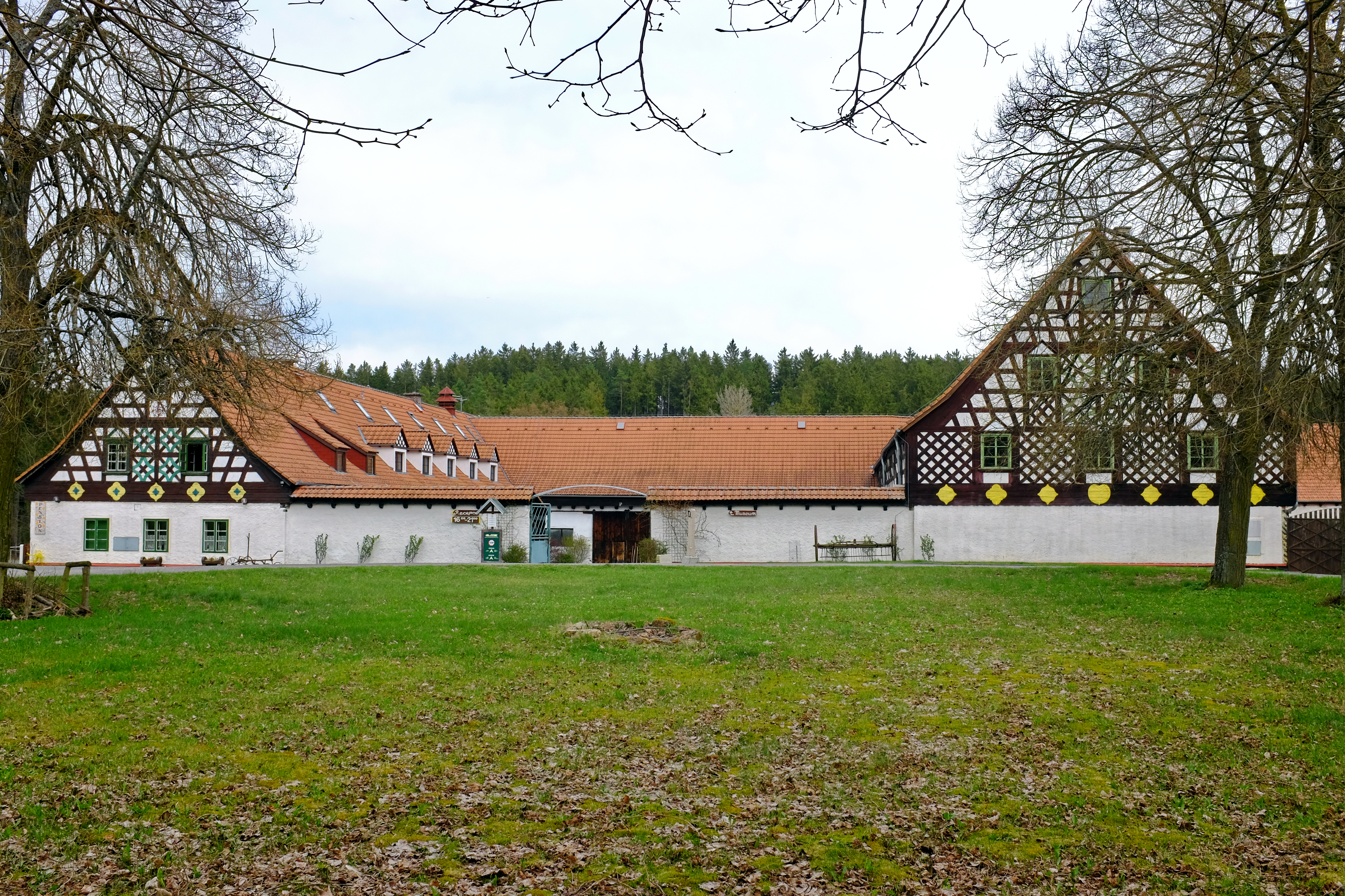 Manský dvůr, Dolní Žandov, okres Cheb